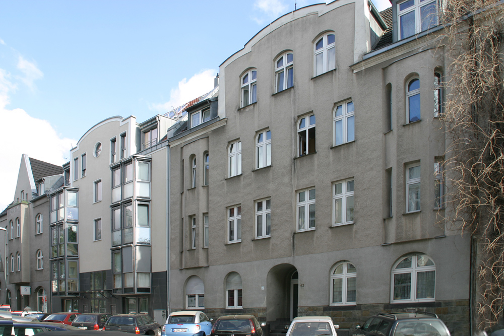 Eichendorffstraße Köln, Genossenschaftshäuser